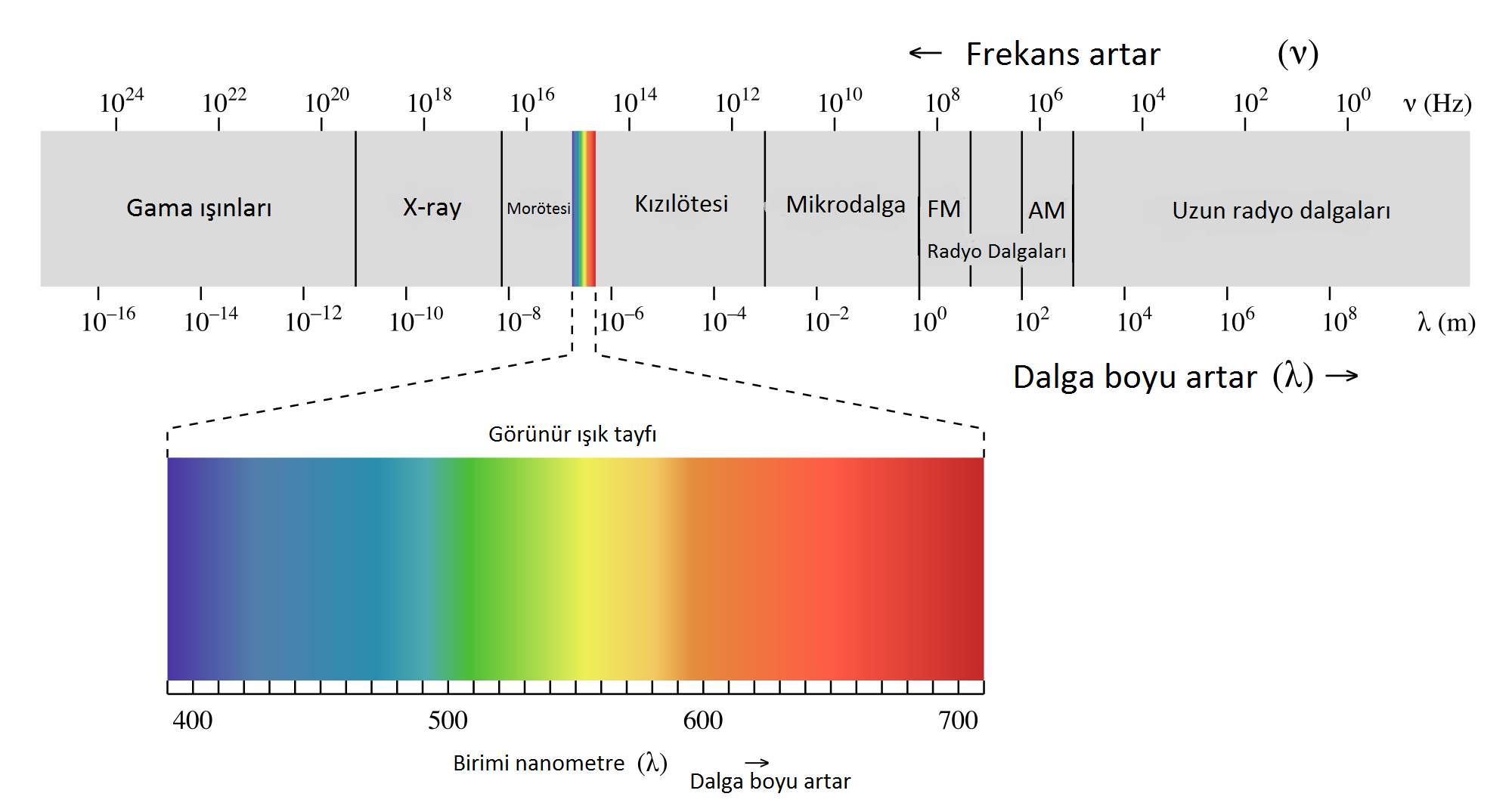 Resmin orijinalini Türkçeleştirdim.